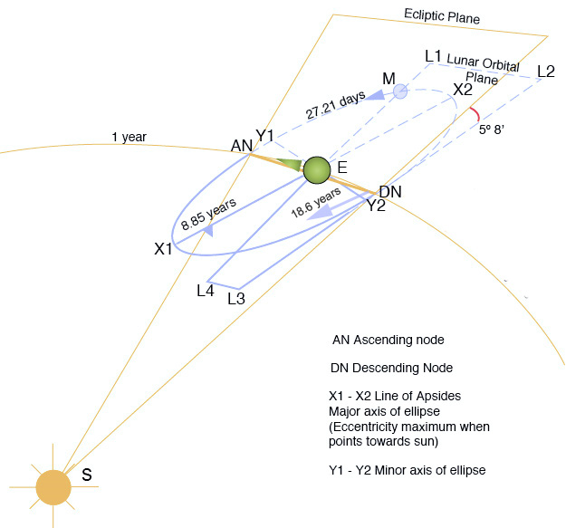 Lunar perturbation